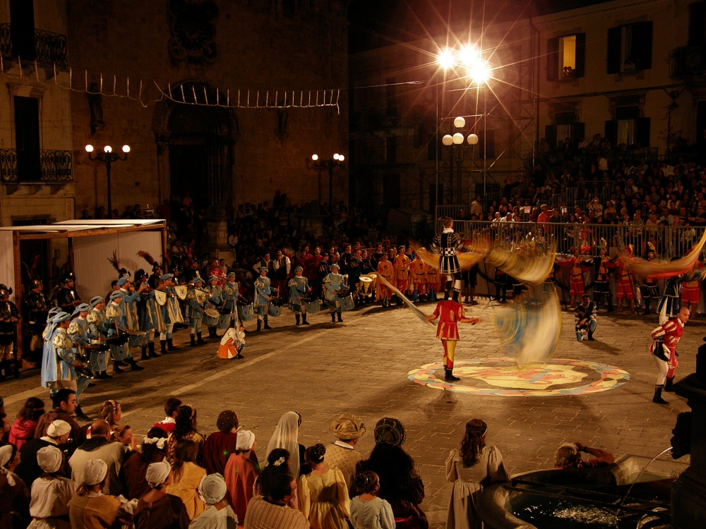 Popoli